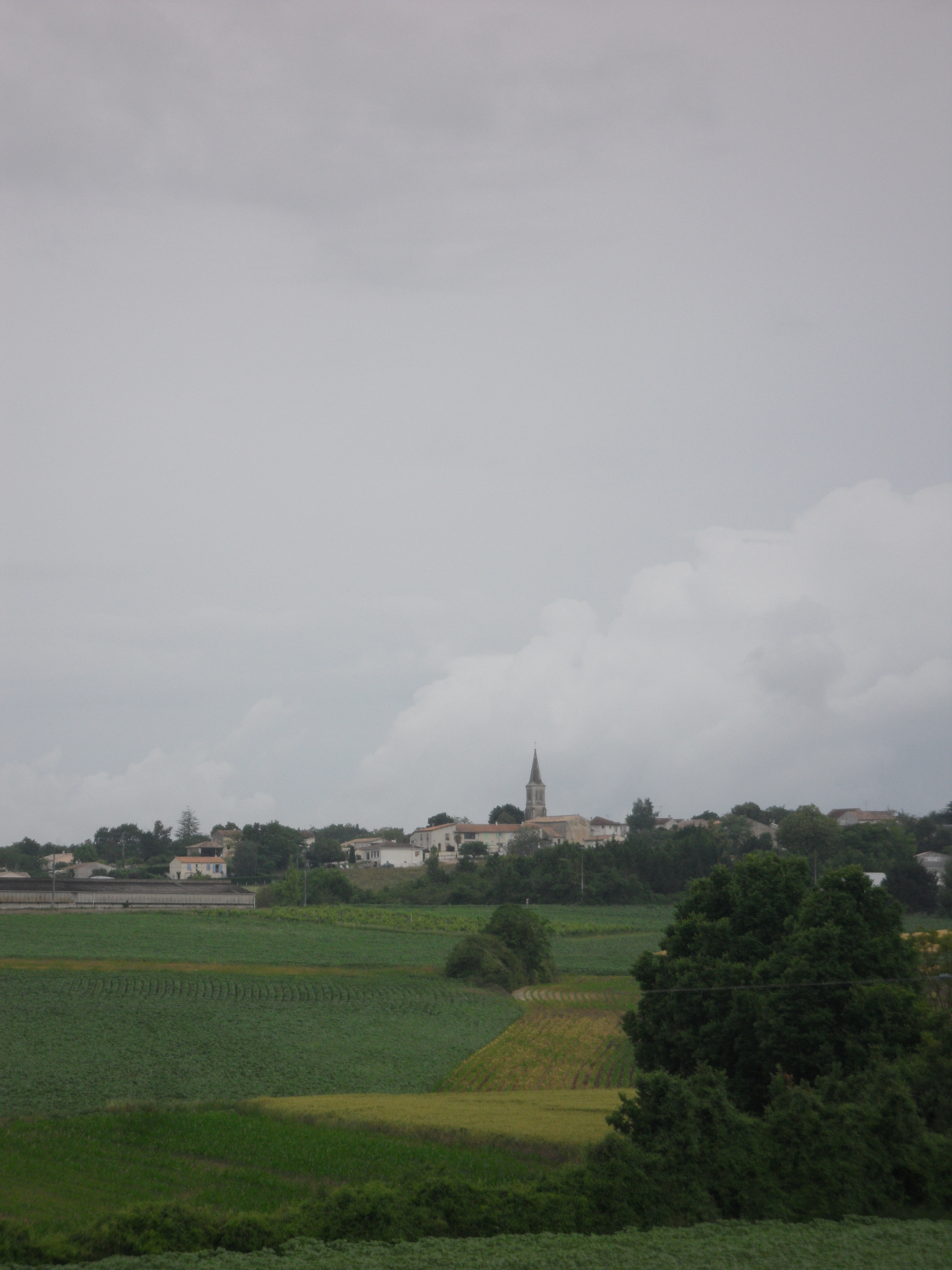 Commune de Soubran